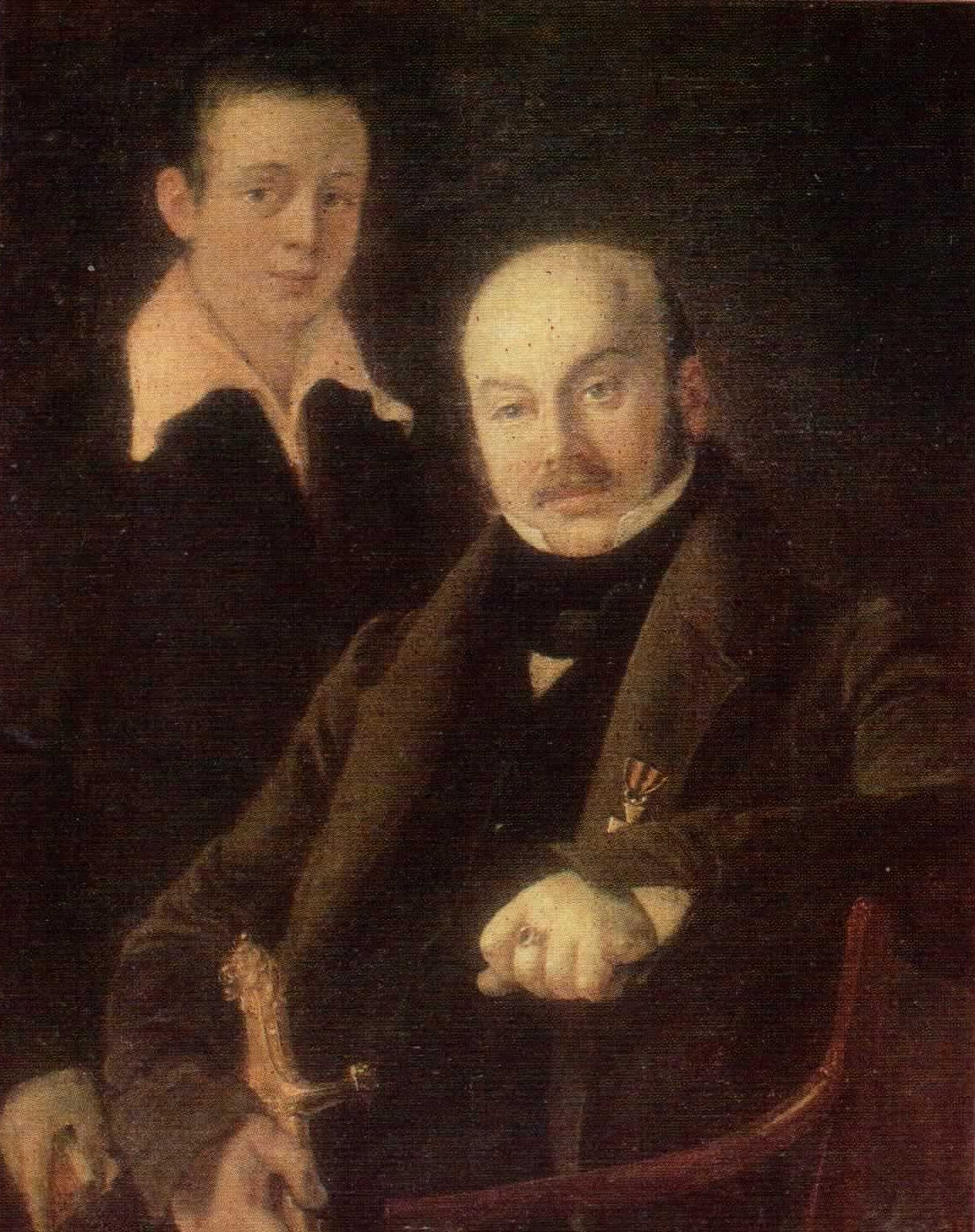 Декабрист Михаил Фёдорович Орлов (1788-1842) с сыном Николаем (1822-1886)